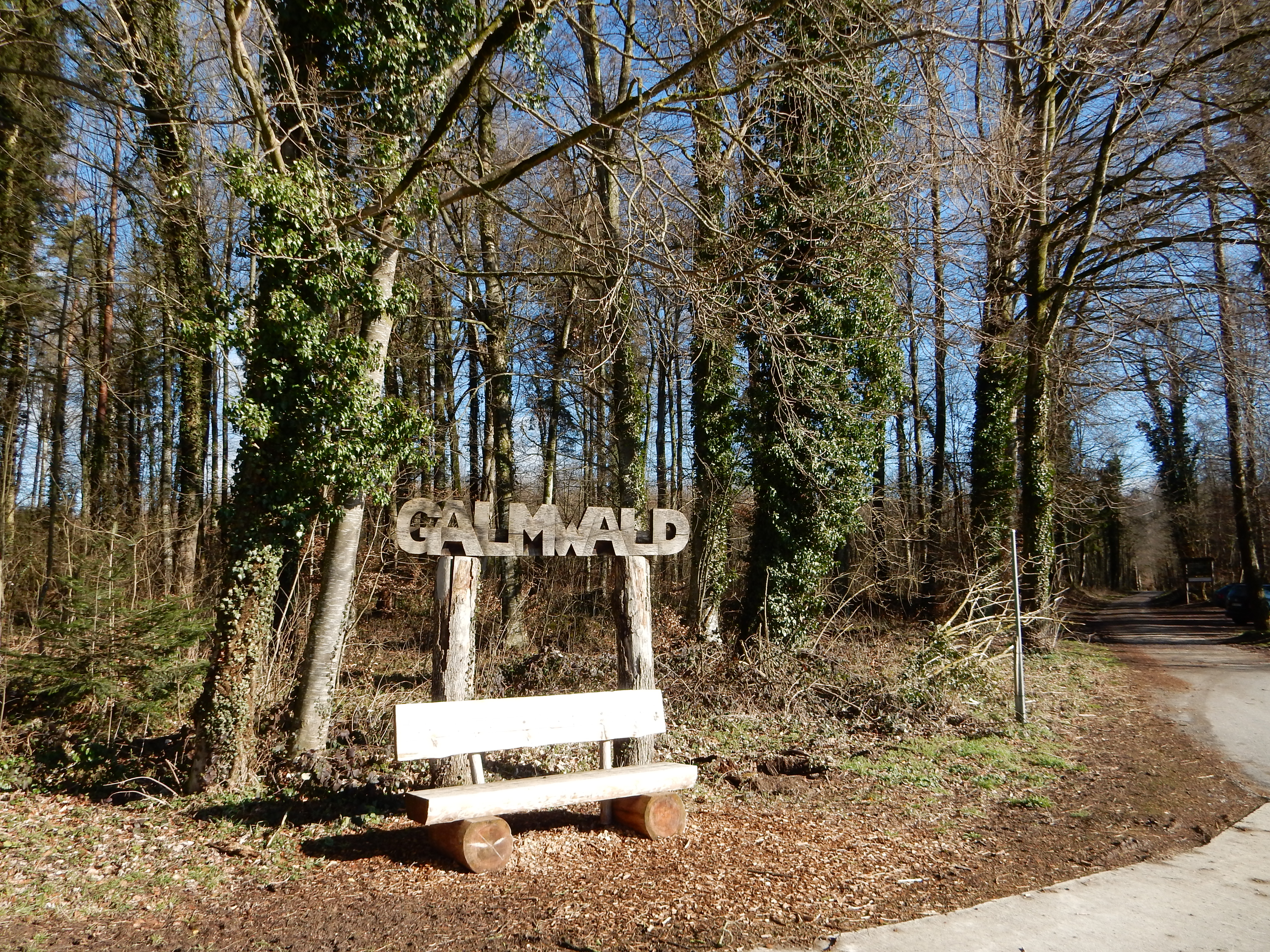 Galmwald beim Galmguet, Kanton Freiburg, Schweiz